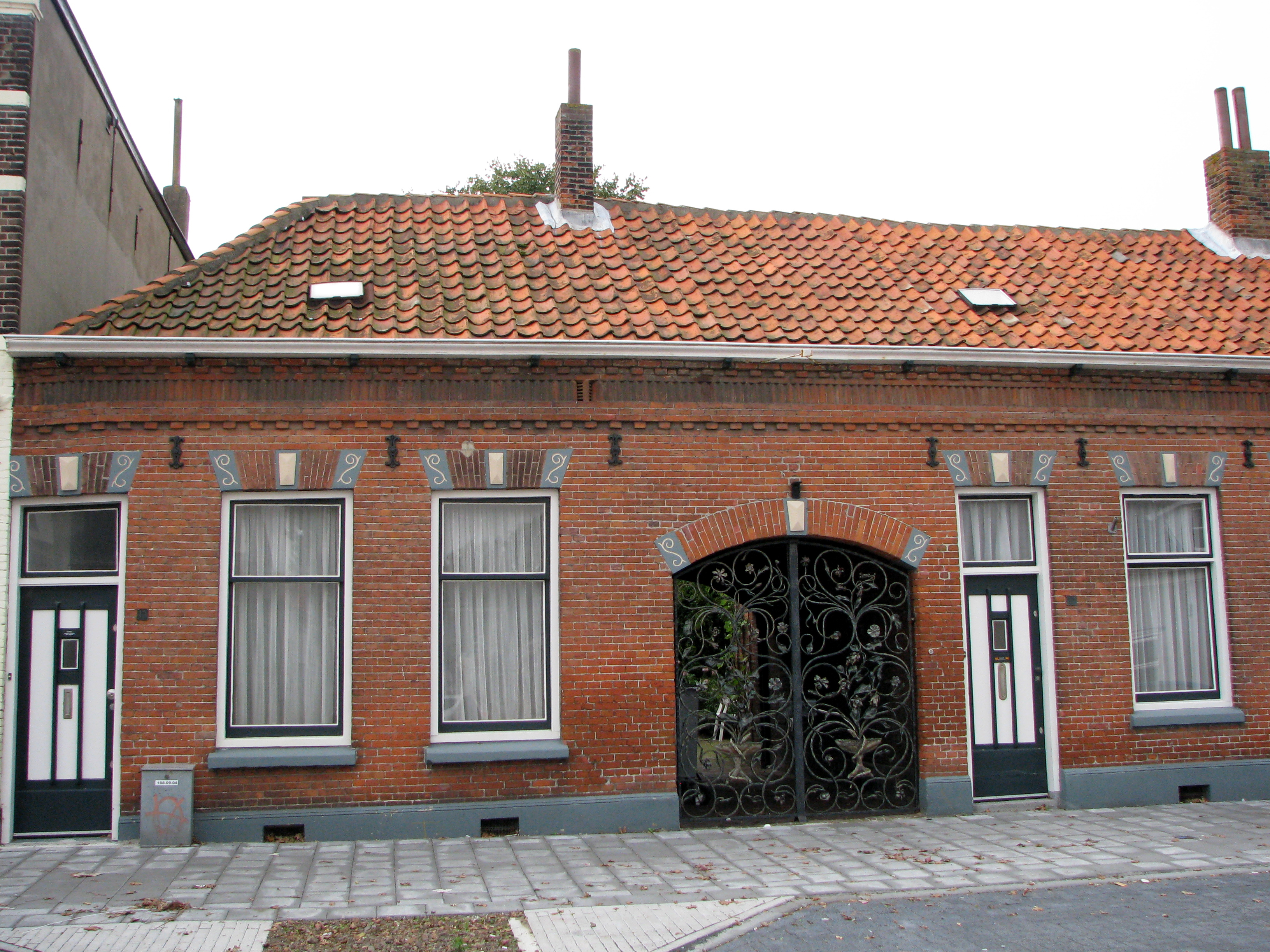 Vlissingen, Hobeinstraat 13-27, inclusief poort naar achterliggend hofje